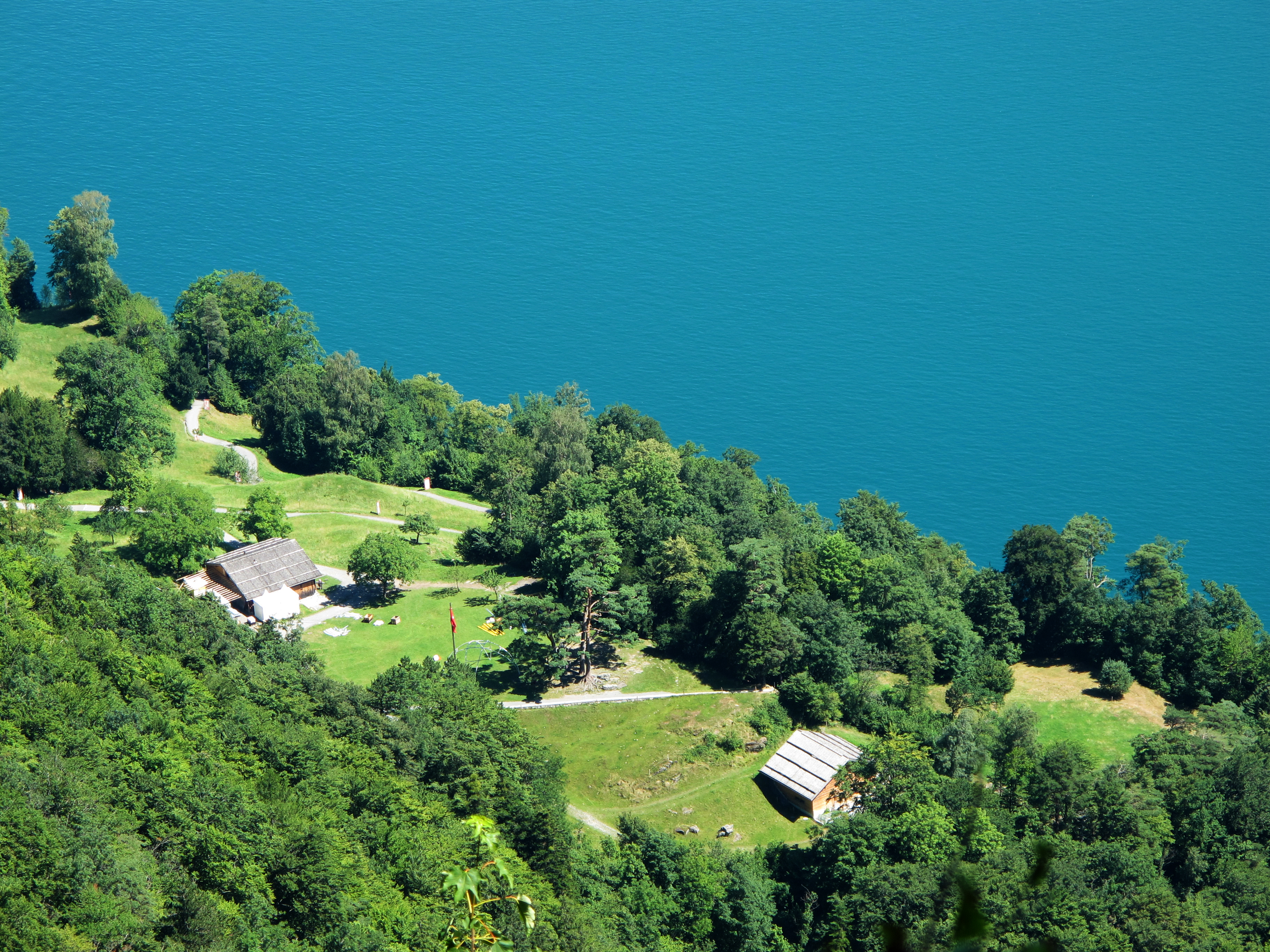 Blick auf die Rütliwiese